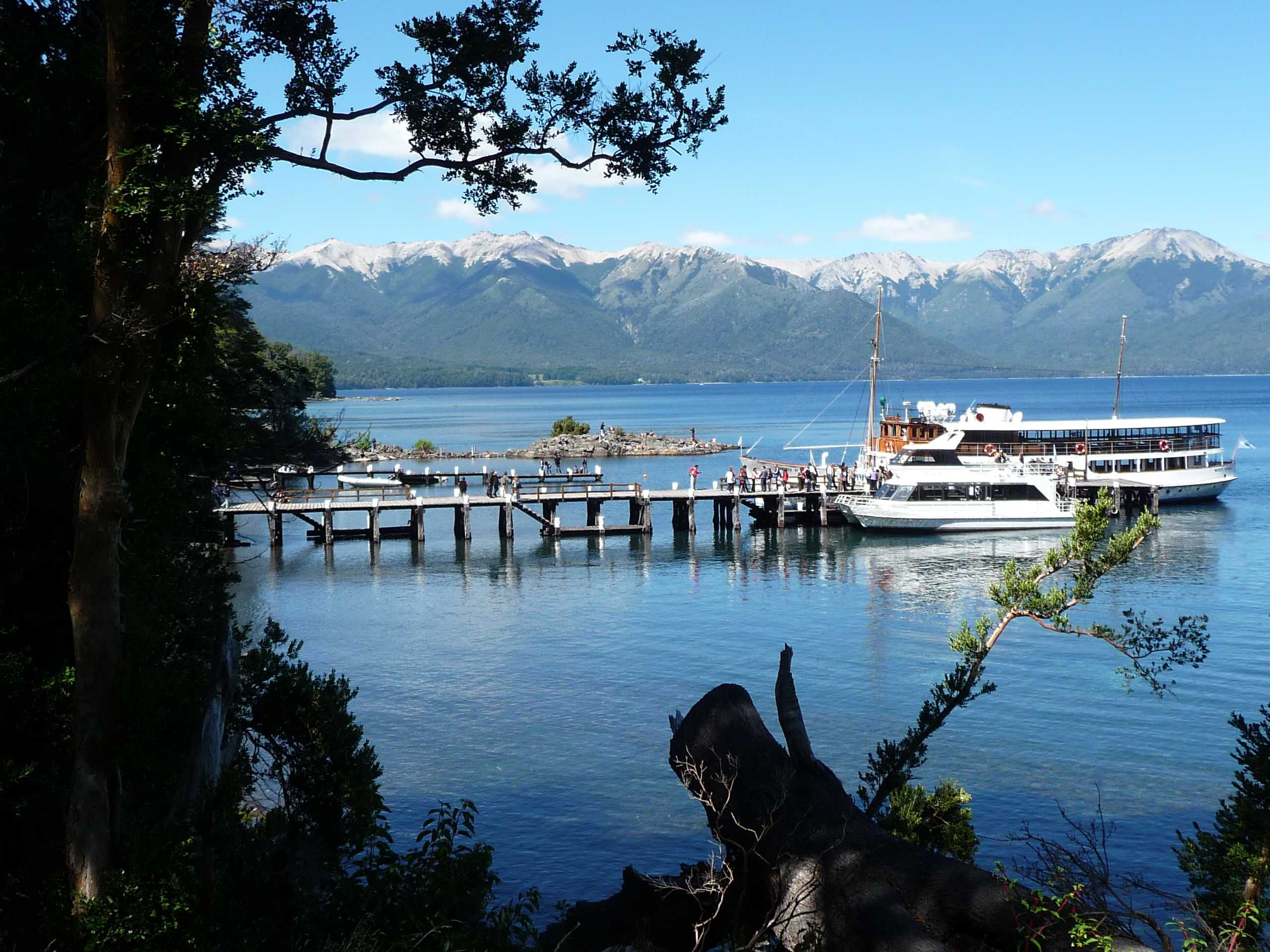 Embarcadero en la península de Quetrihué, sitio de entrada al Parque Nacional Los Arrayanes desde el Lago Nahuel Huapi. Amarrado al muelle se ve el Modesta Victoria, barco histórico que hace recorridos turísticos en dicho lago.